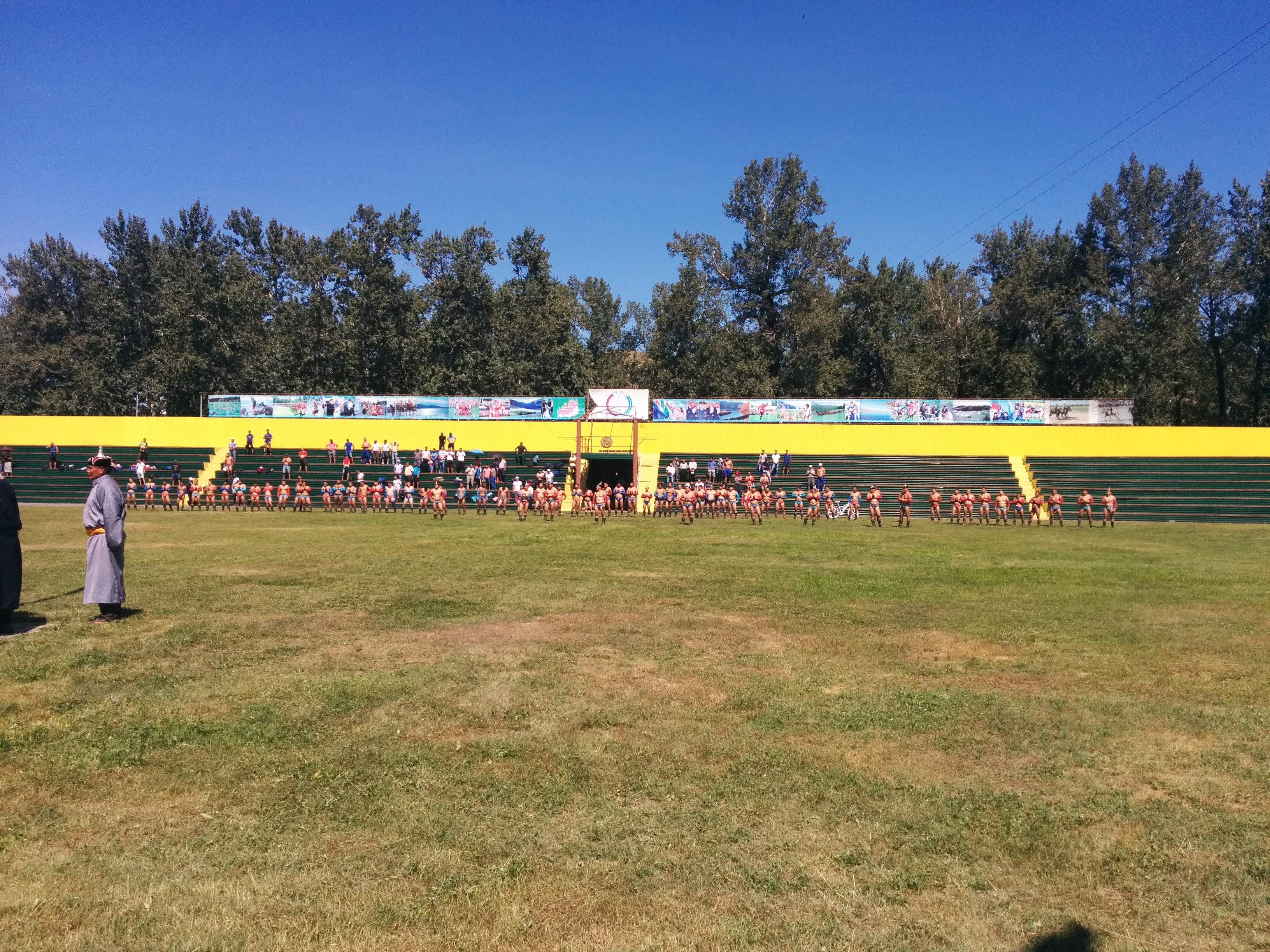 Тыва дыл: "Хүреш" стадионунда мөгелер самы, эгези